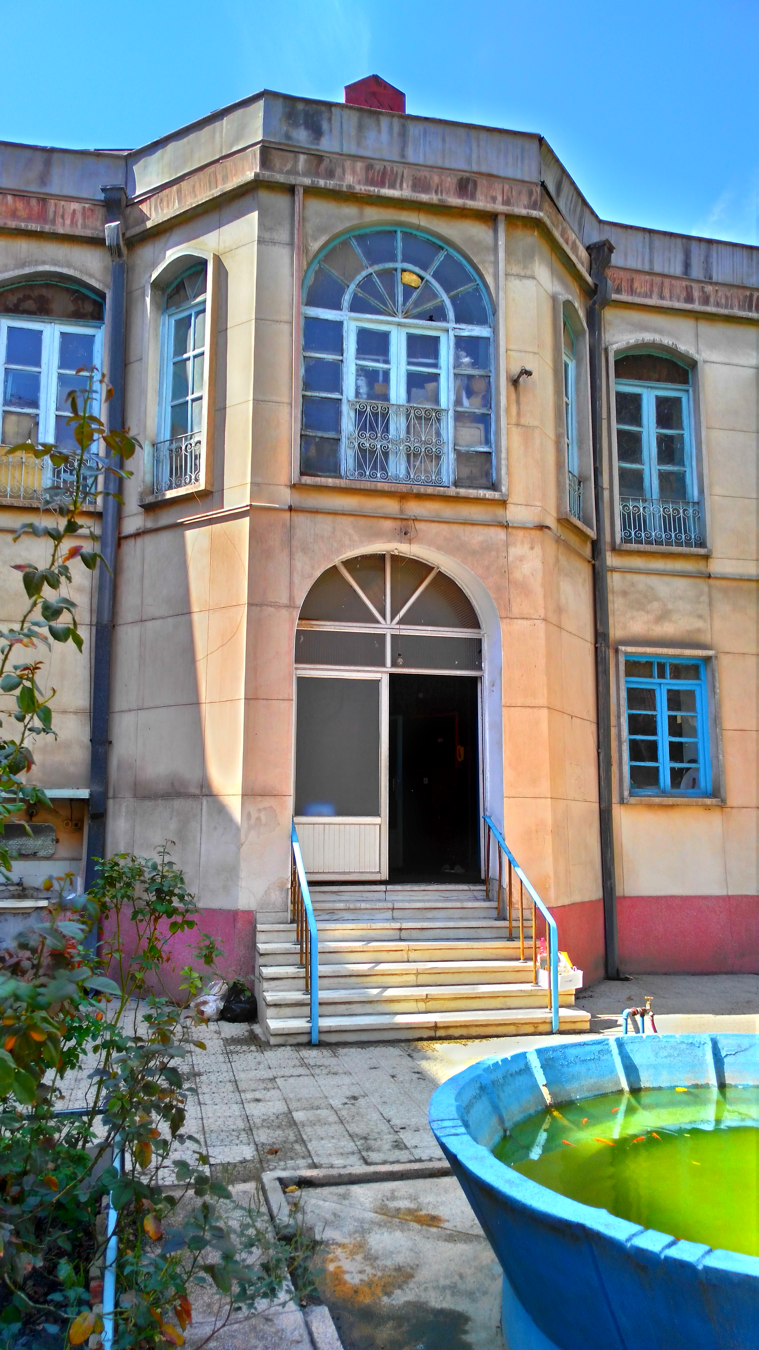 کنیسه حیم